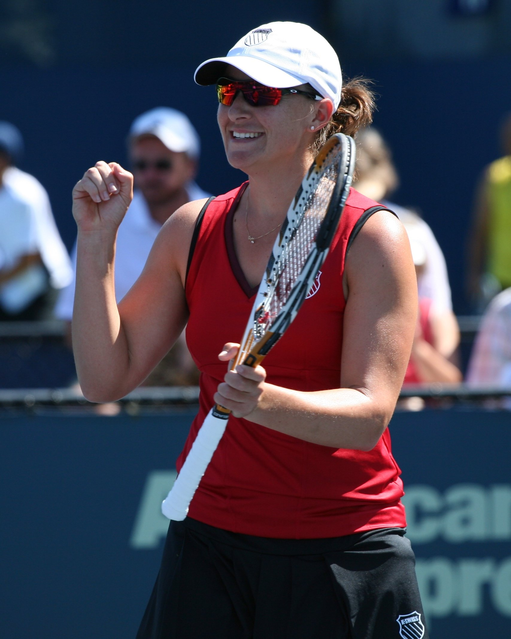 U.S. Open; Wednesday, Sept. 2, 2009